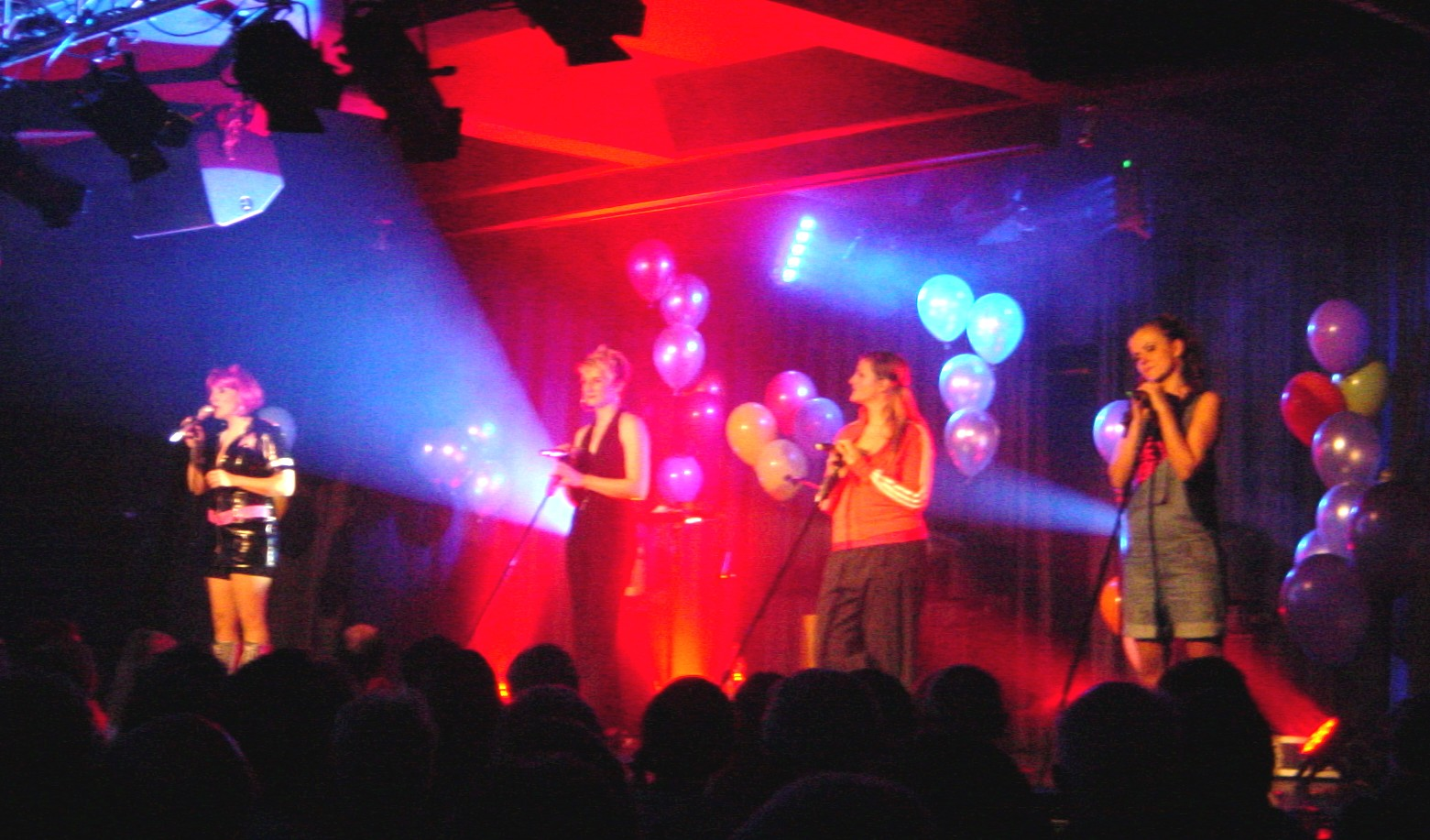 Musikgruppe Medlz beim Auftritt im Q24 in Pirna am 13.April 2013